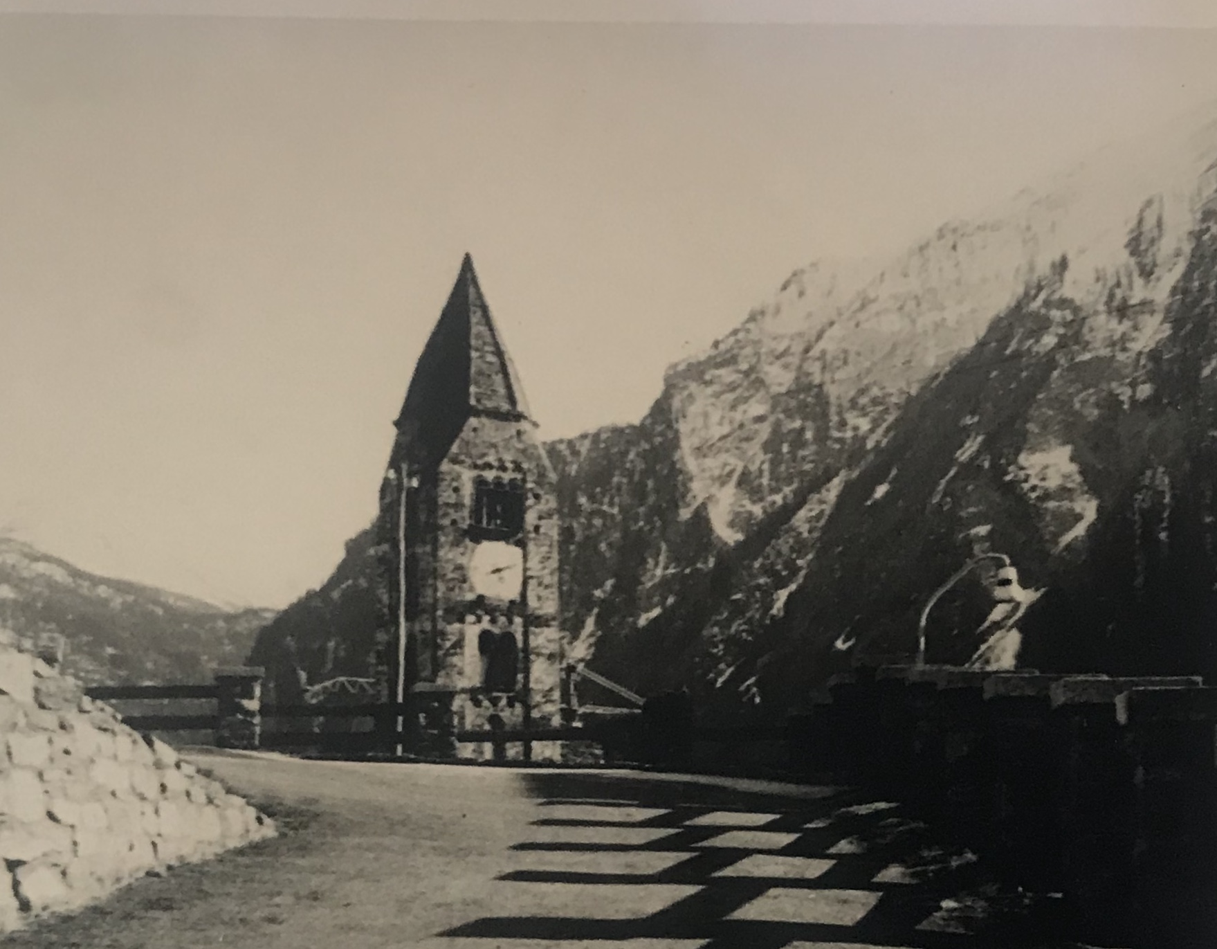 Il campanile della Chiesa di San Pantaleone (Courmayeur) negli anni Sessanta del Novecento